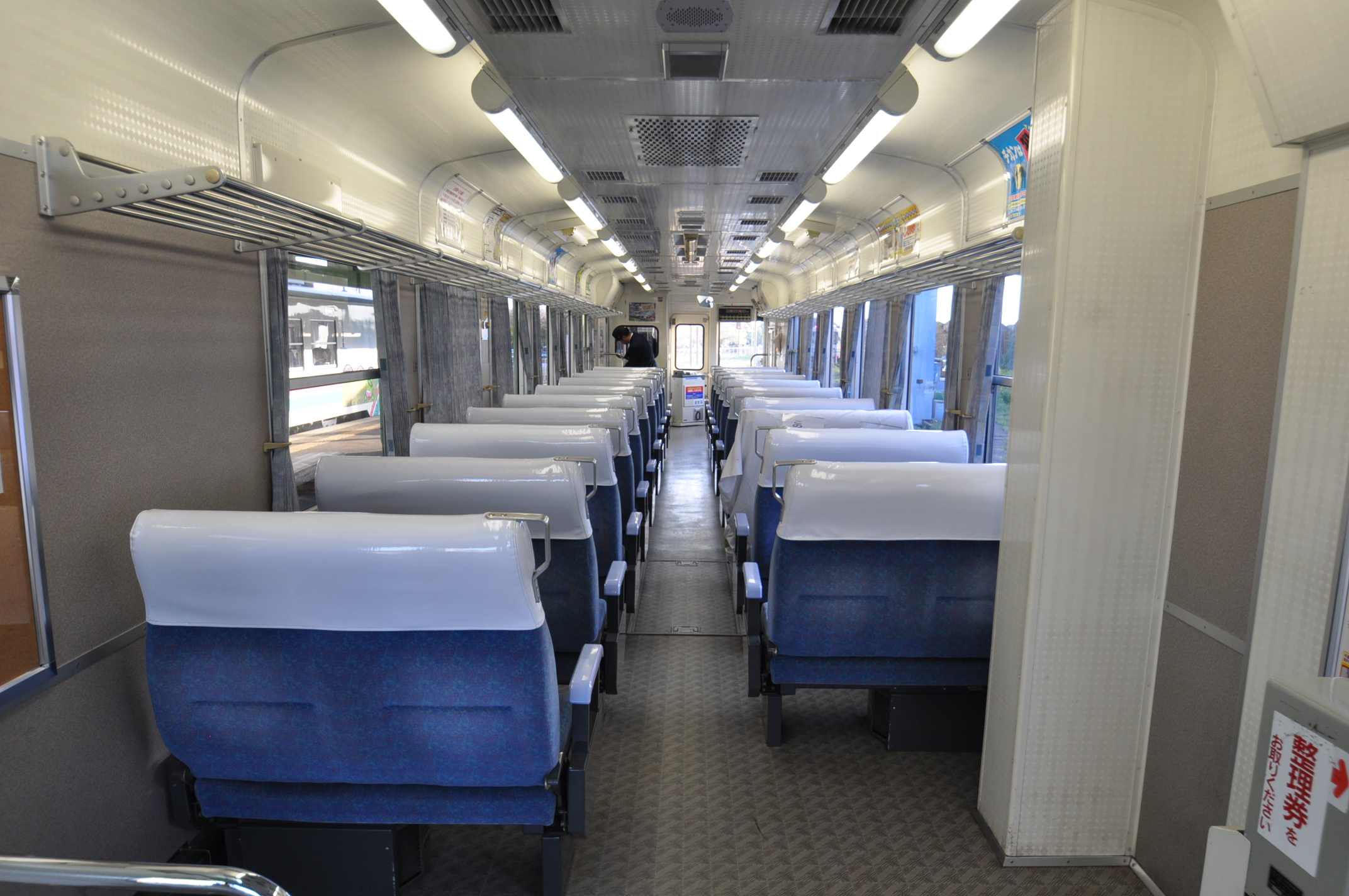 甘木鉄道ＡＲ４００形気動車（車内）